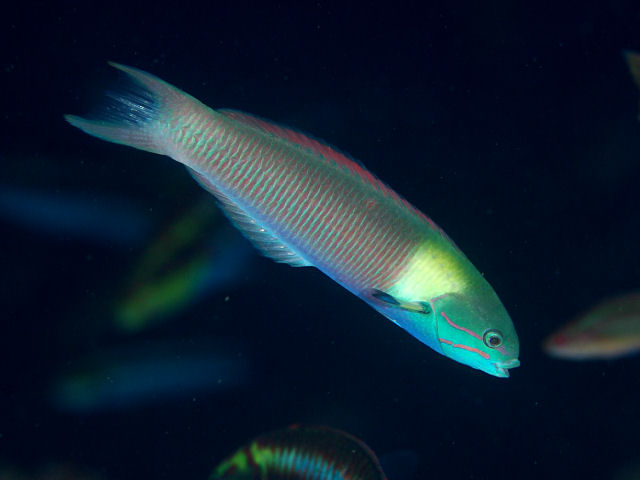 コガシラベラ Thalassoma amblycephalum